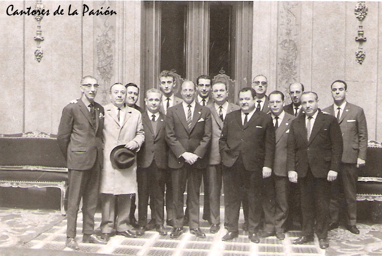 Madrid